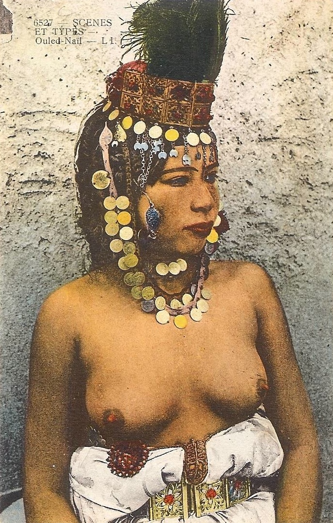 Levy & Fils postcards